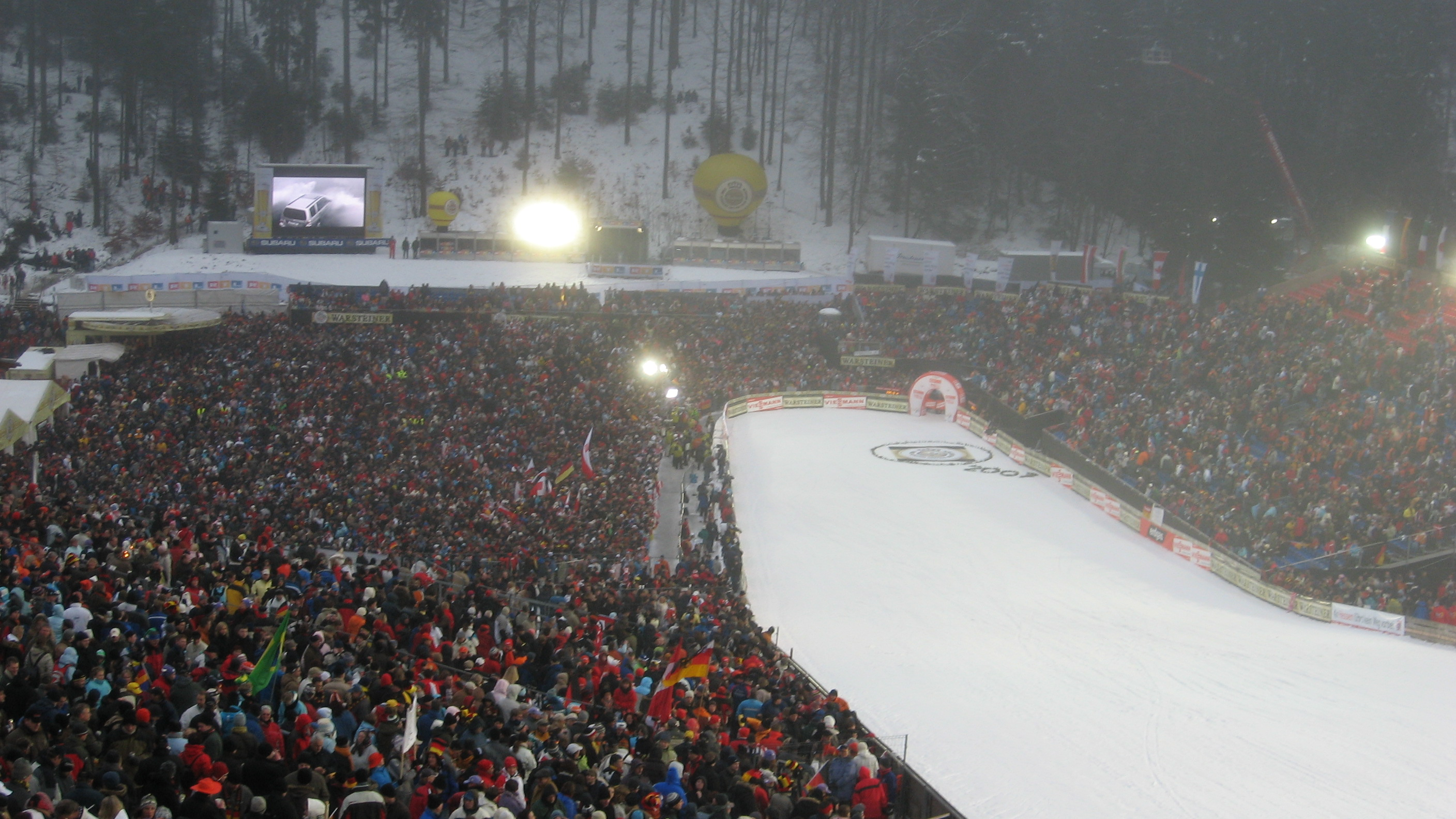 Skijumping Word Cup at Mühlenkopschanze ski jump in willingen